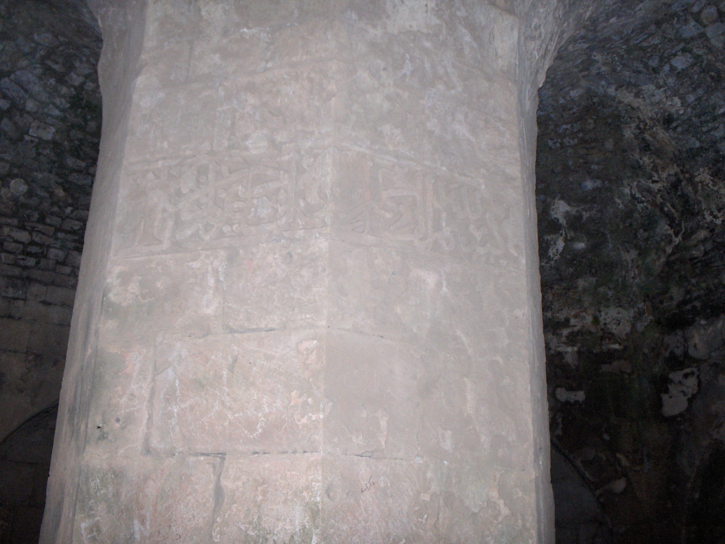 Pilone all'interno della Torre del Mulino del Krak dei Cavalieri su cui si legge un'iscrizione di Baibars